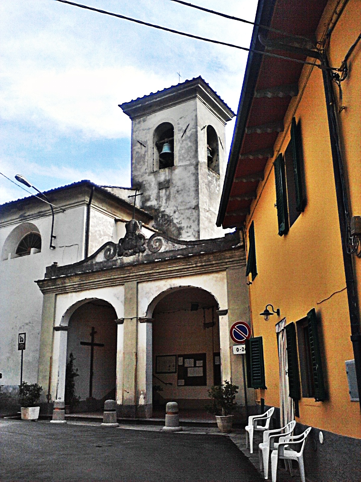 Chiesa di San Michele a Fognano, frazione di Montale